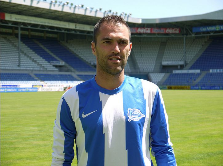 Luciano González Groba